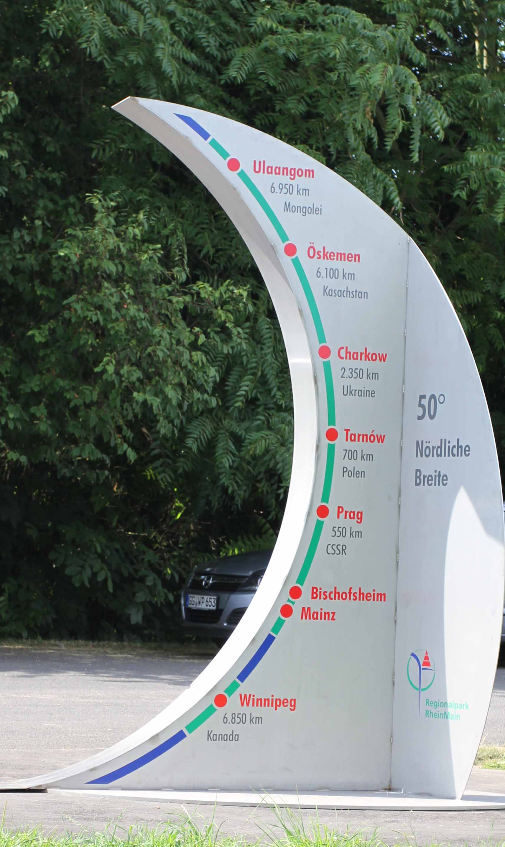 Geodesia Stele im Regionalpark Rhein-Main